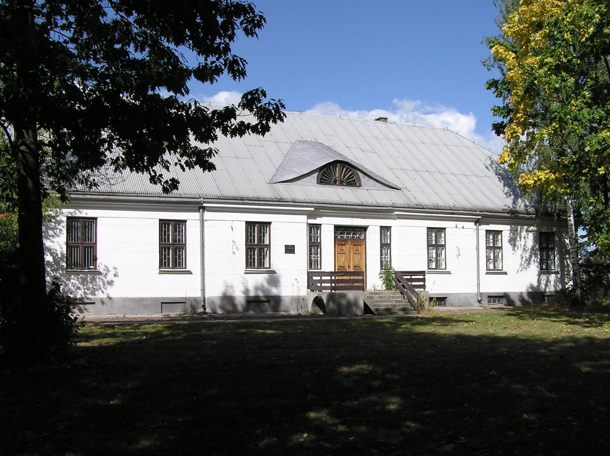 Płońsk Poświętne, ul. Sienkiewicza 11 - dwór, gdzie mieszkał i był guwernerem Henryk Sienkiewicz (zabytek nr A-212)